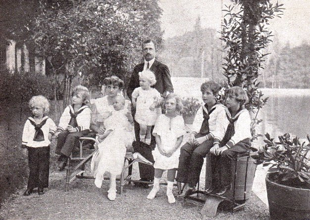 IV. Károly magyar király és családja Madeira szigetén, Funchalban. Postcard.